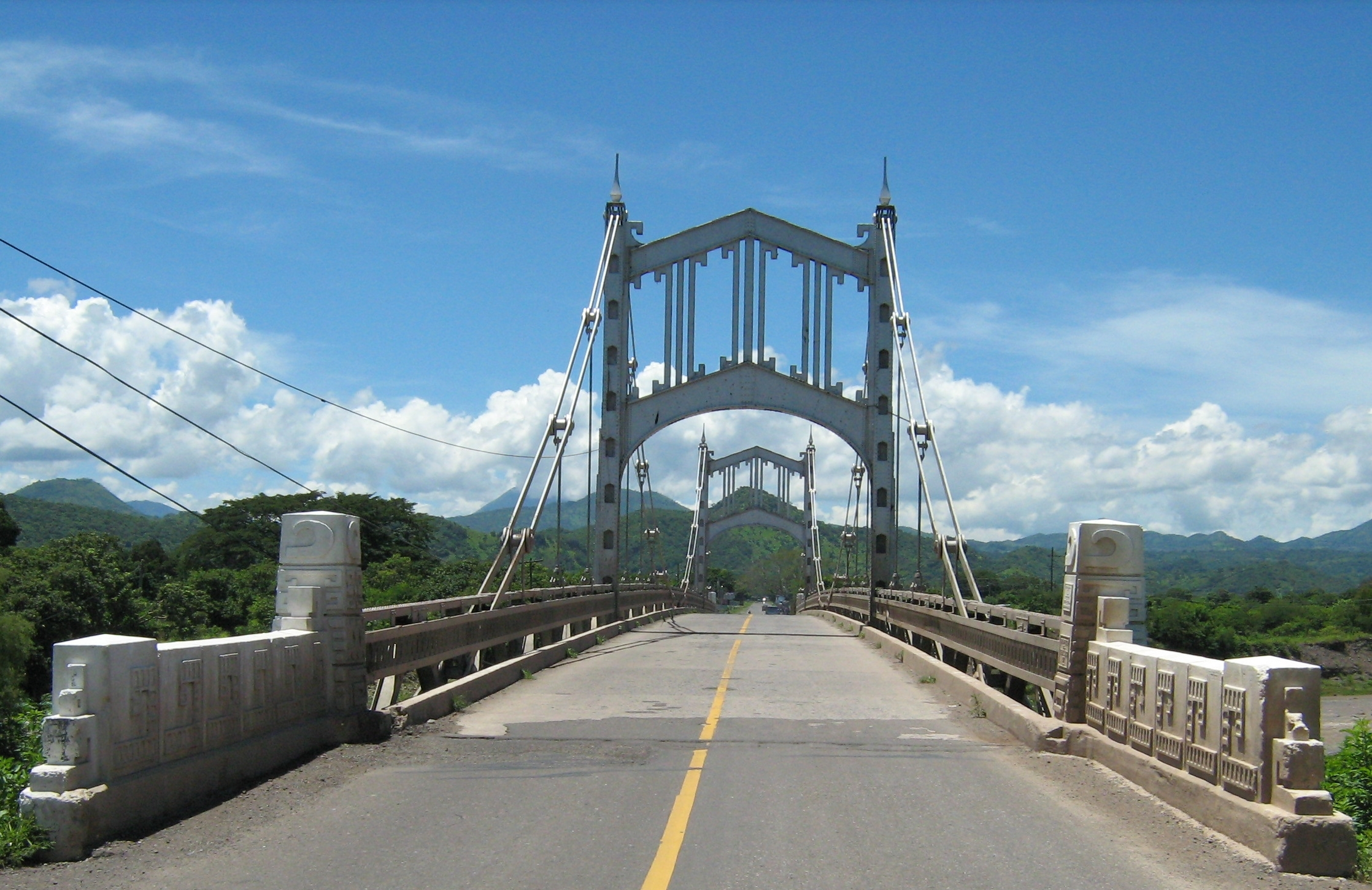 puente tamazulapa